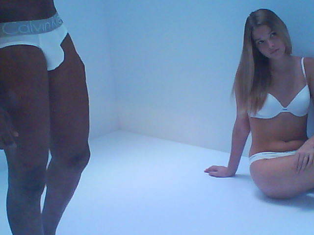 內衣模特兒